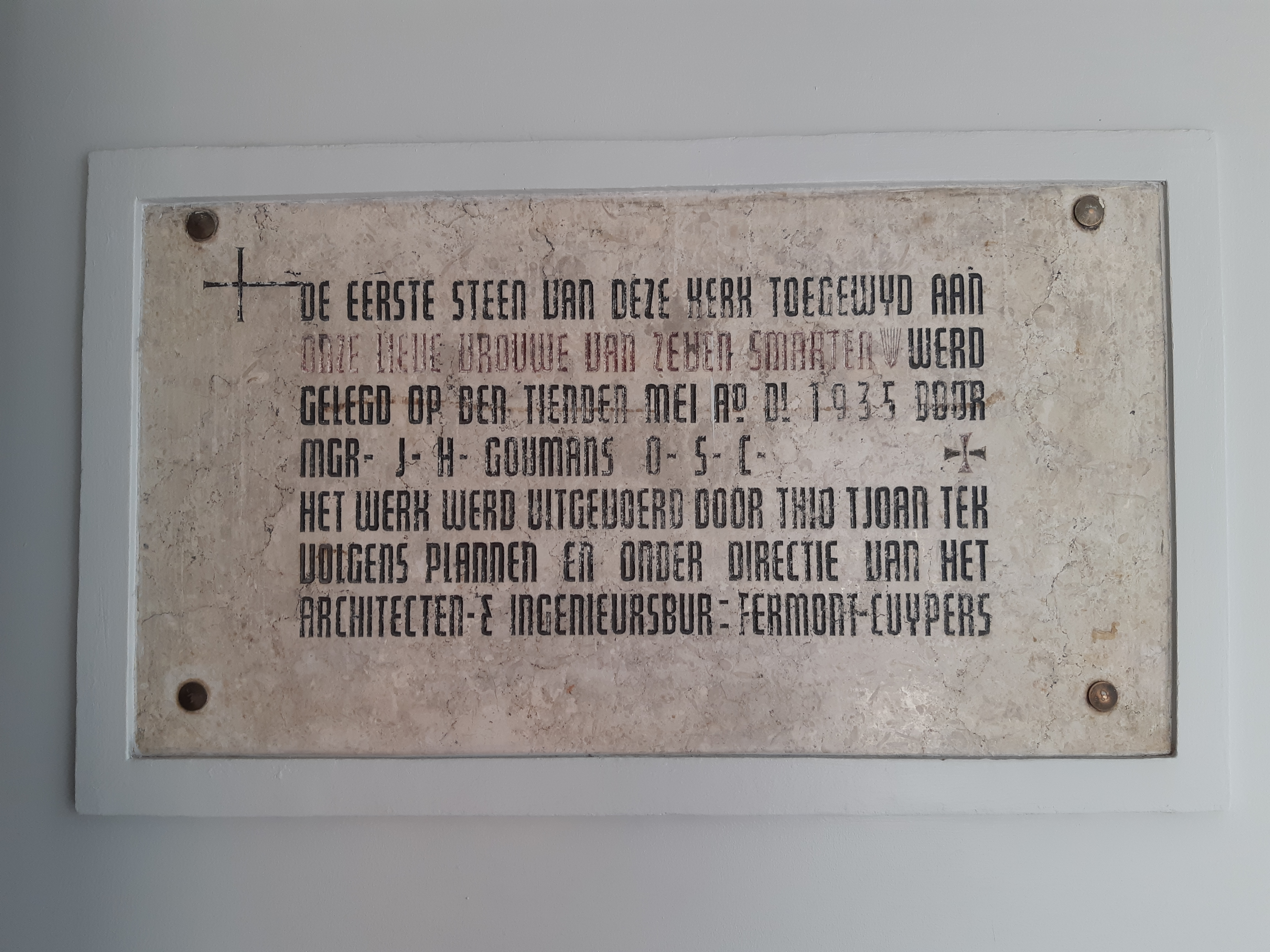 Gereja Pandu Bandung